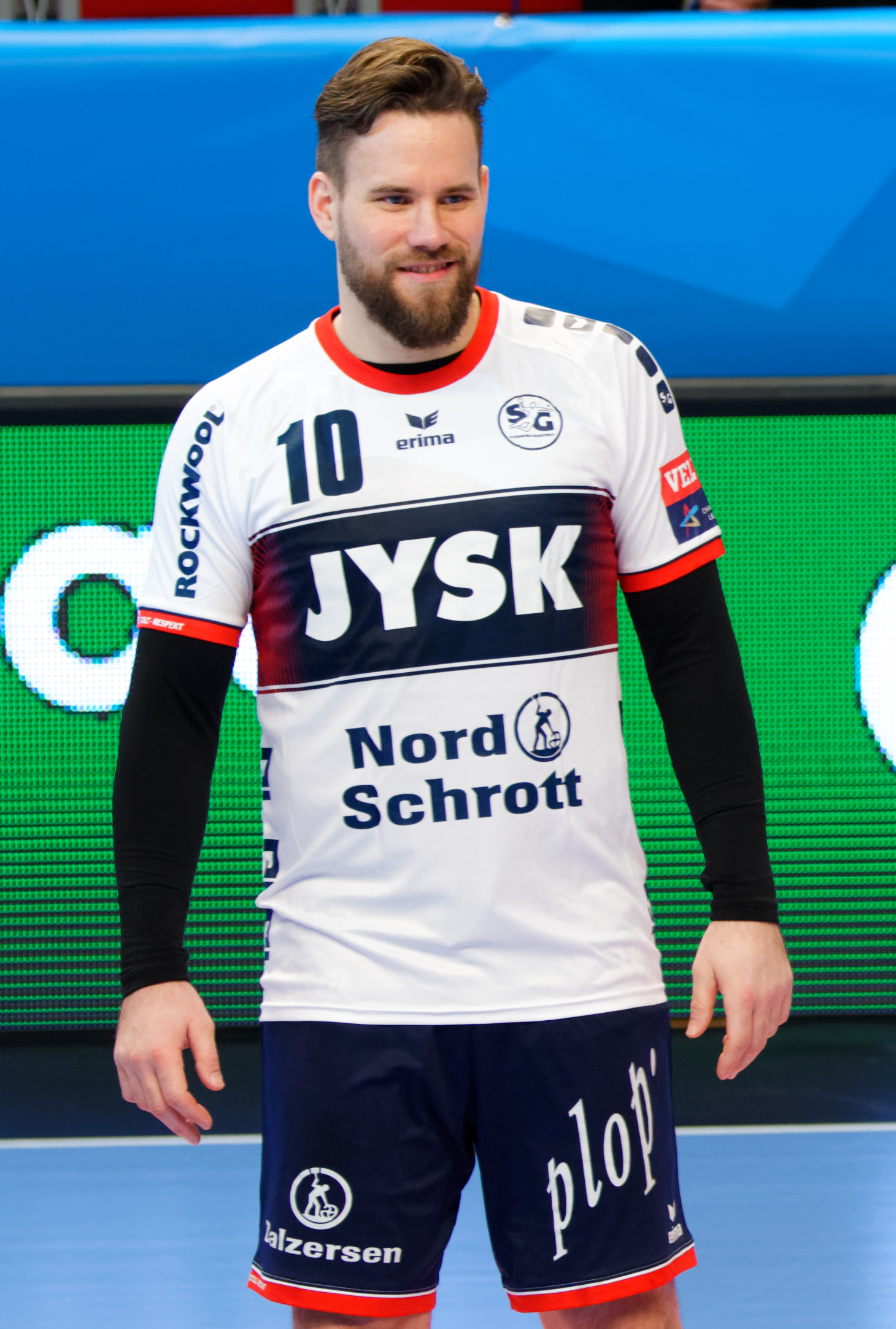 Rencontre de phase de groupe de la ligue des champions 2017/18 entre le PSG et SG Flensburg. A Coubertin, le 17 février 2018.